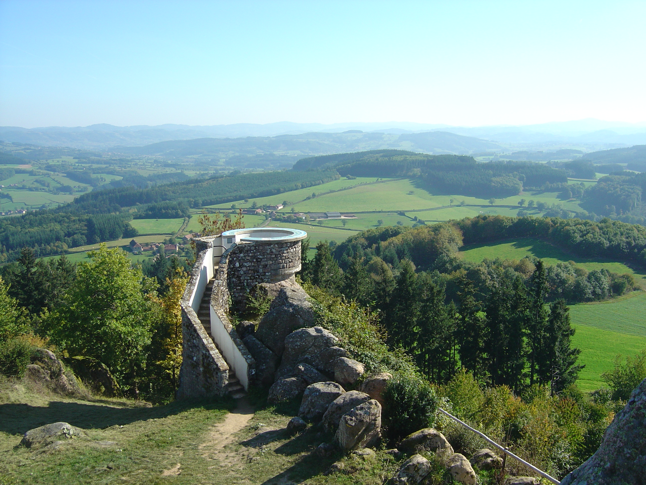 Table d'orientation de la butte de Suin (593m) et panorama vus depuis le rocher de la Vierge